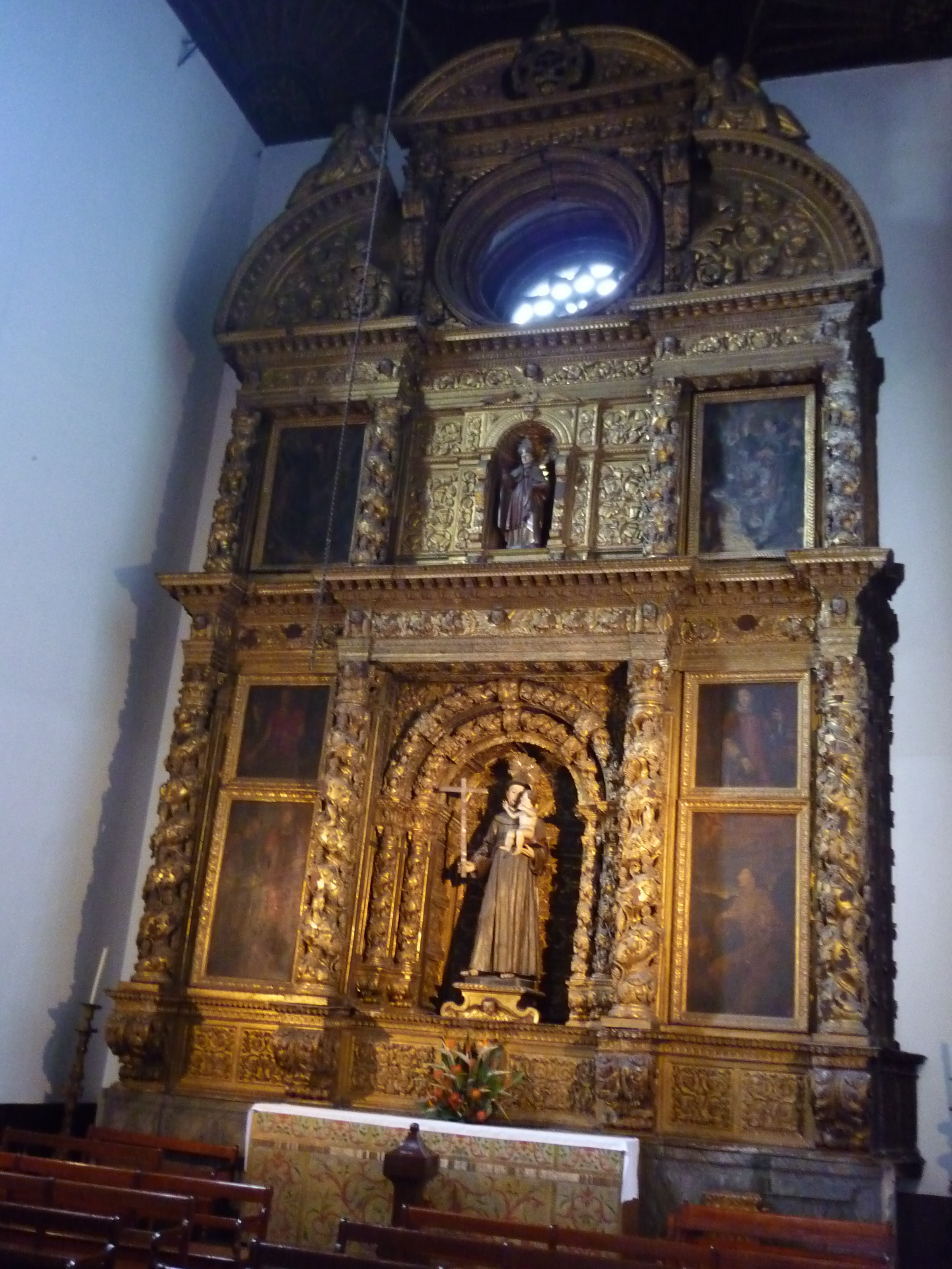 Szent Antal oltára a funchali (Madeira) székesegyházban (17. század vége – 18. század eleje)